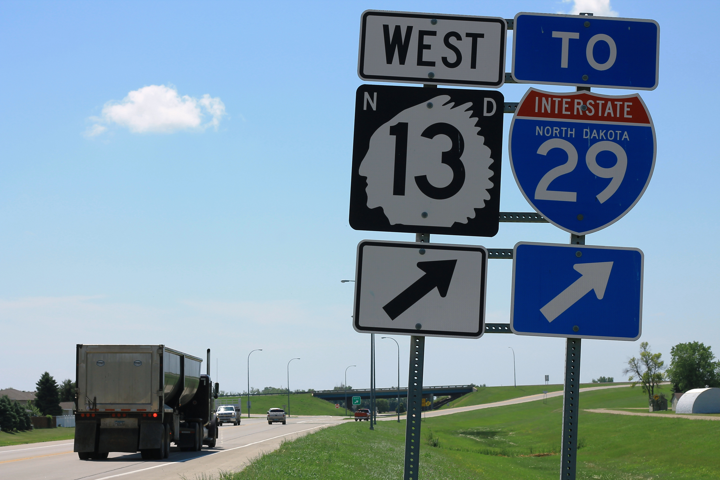 ND210 West - ND13 West To I-29 Signs